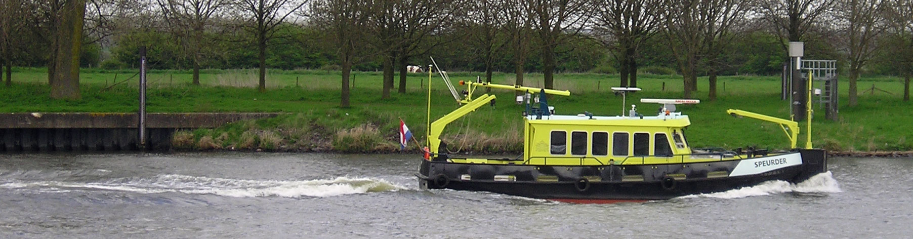 Boot Speurder Rijkswaterstaat, Nederland. Foto genomen te Grave.